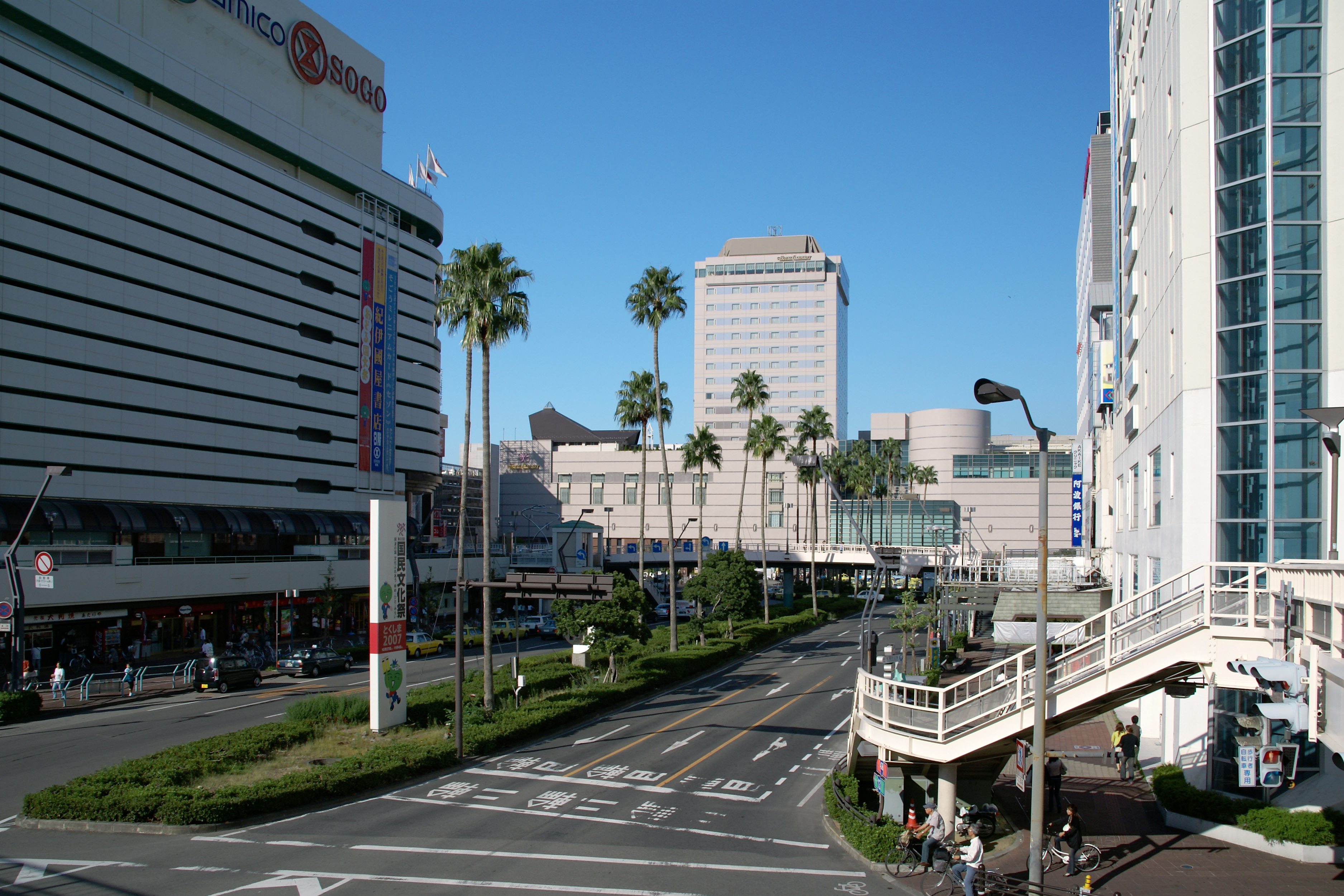 Motomachi, Tokushima, Tokushima prefecture, Japan